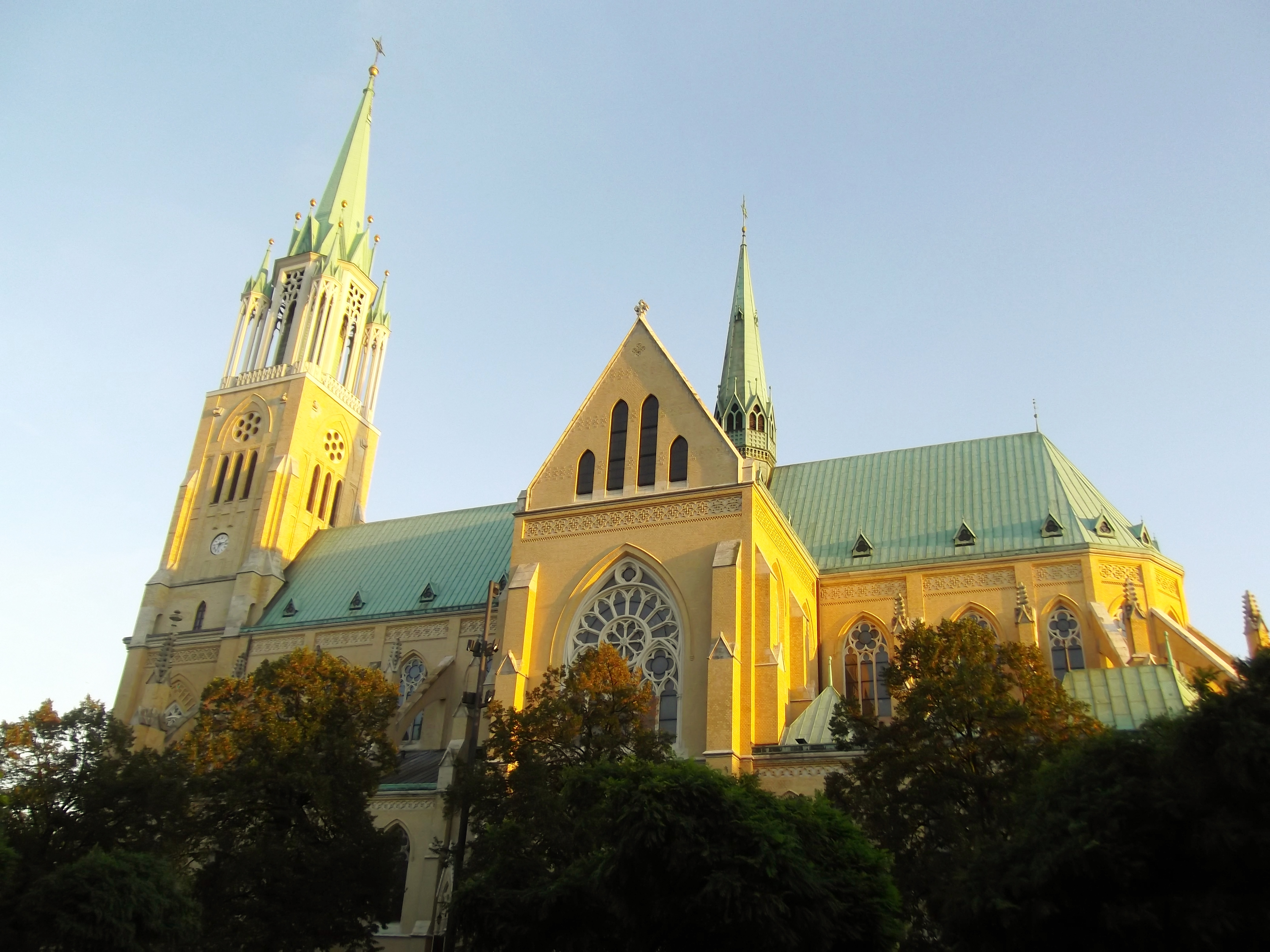 Łódź, kościół katedralny św. Stanisława Kostki, 1901–1912, 1927